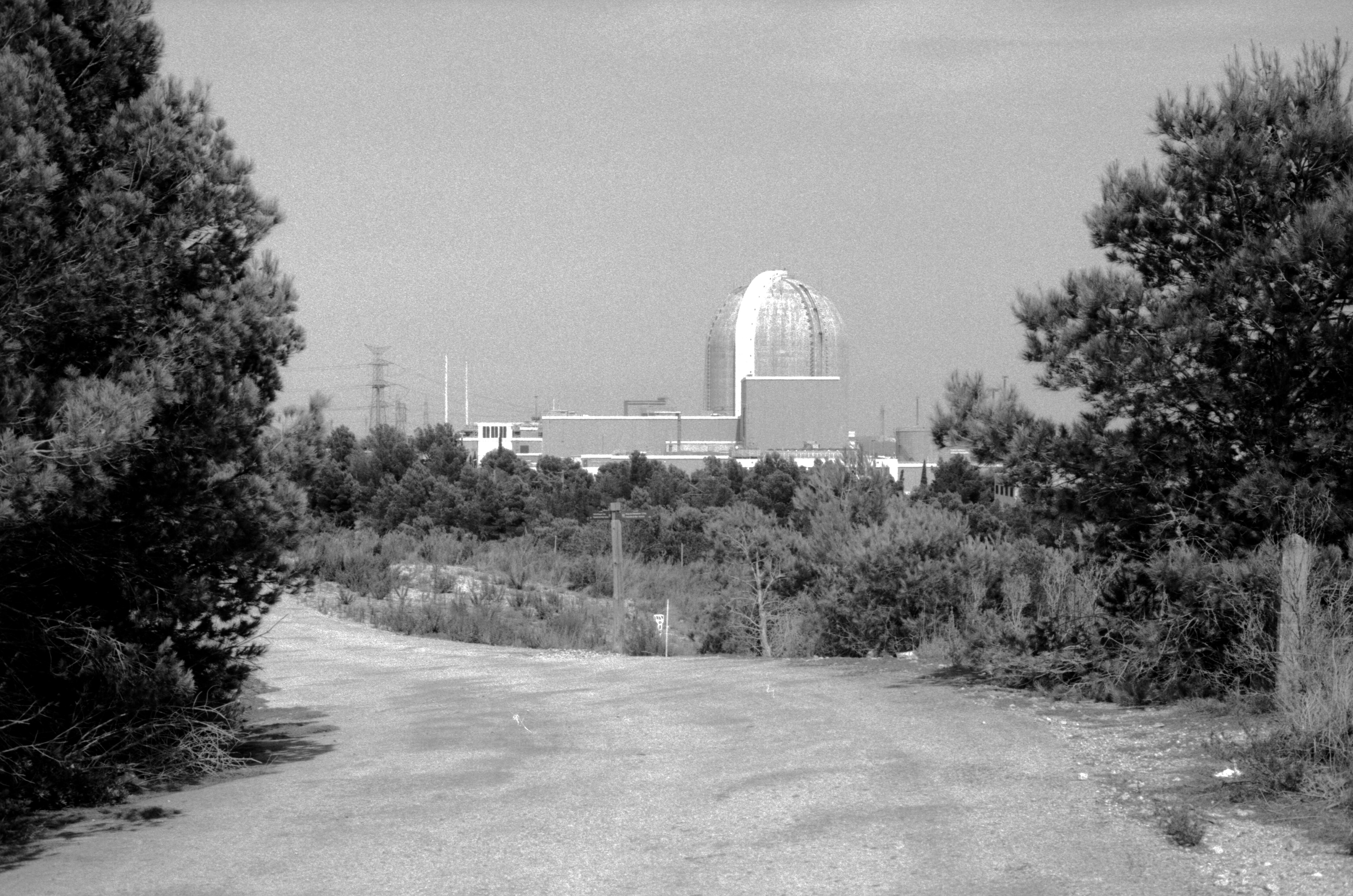 Central Nuclear de Vandellos